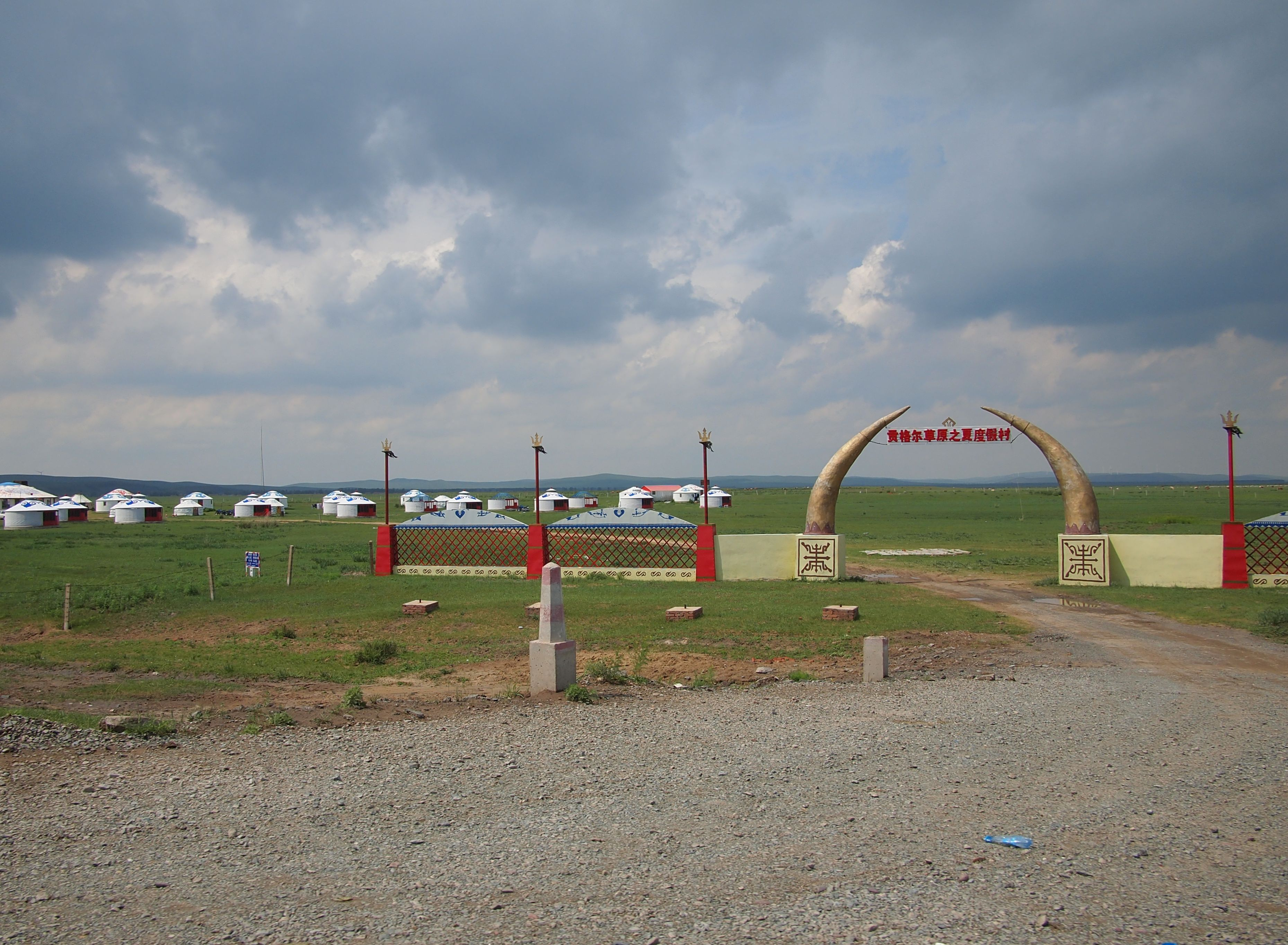 贡格尔草原之夏度假村 - Gongger "Grassland Summer" Resort - 2011.06